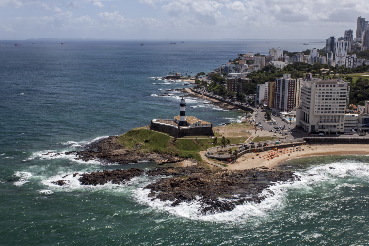 A Ponta de Santo Antônio, o Edifício Oceania, o Farol da Barra, Forte de Santo Antônio da Barra no Largo do Farol da Barra, em Salvador.